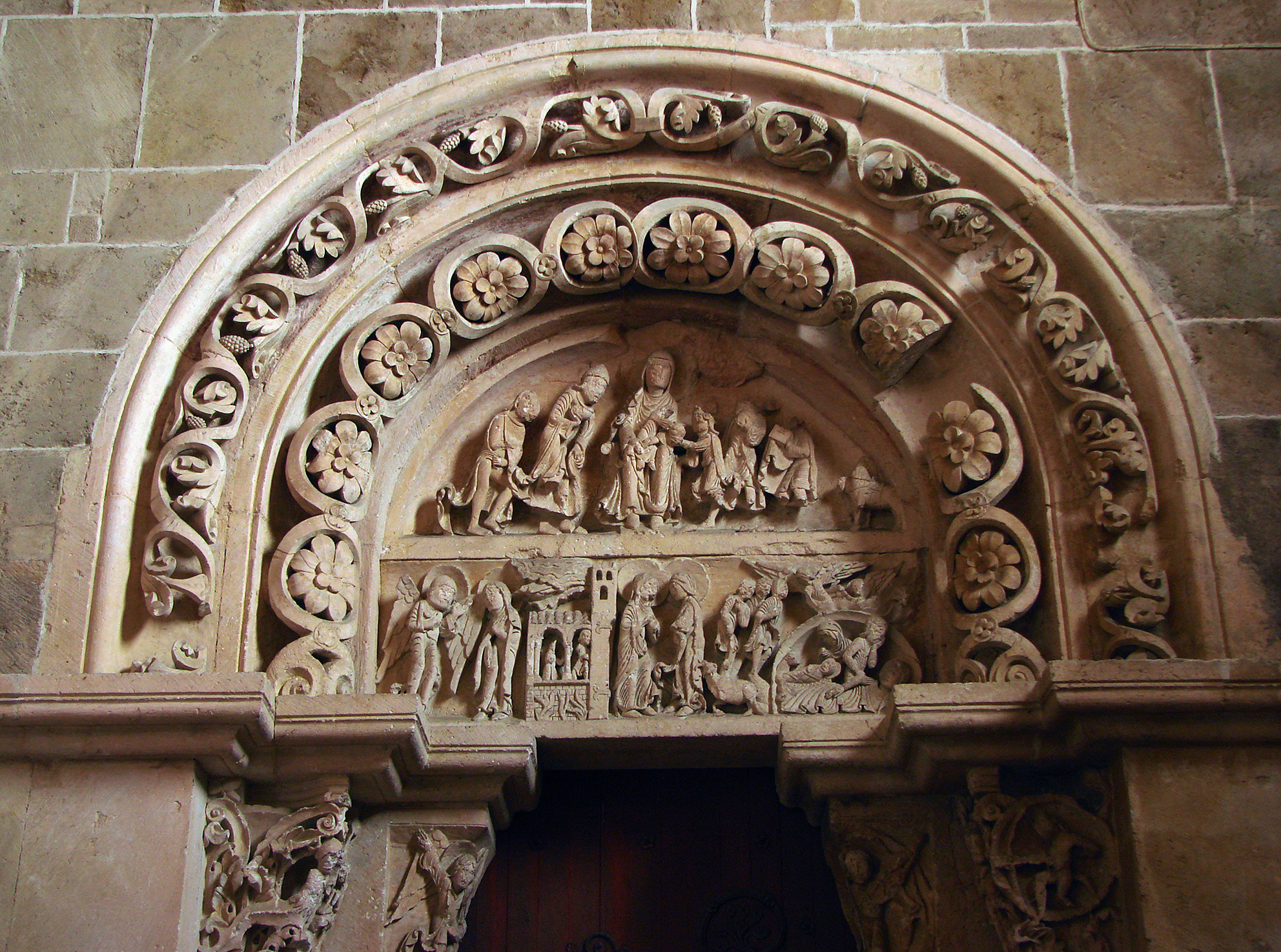 Tympan du portail Sud du narthex (1140 à 1150), figurant la naissance du Christ. Basilique Sainte-Marie-Madeleine de Vézelay.